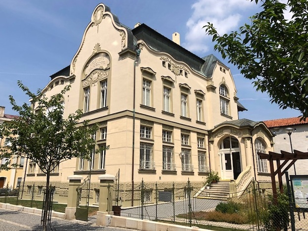 Městská knihovna v Chebu, původně Kreuzingerova lidová knihovna